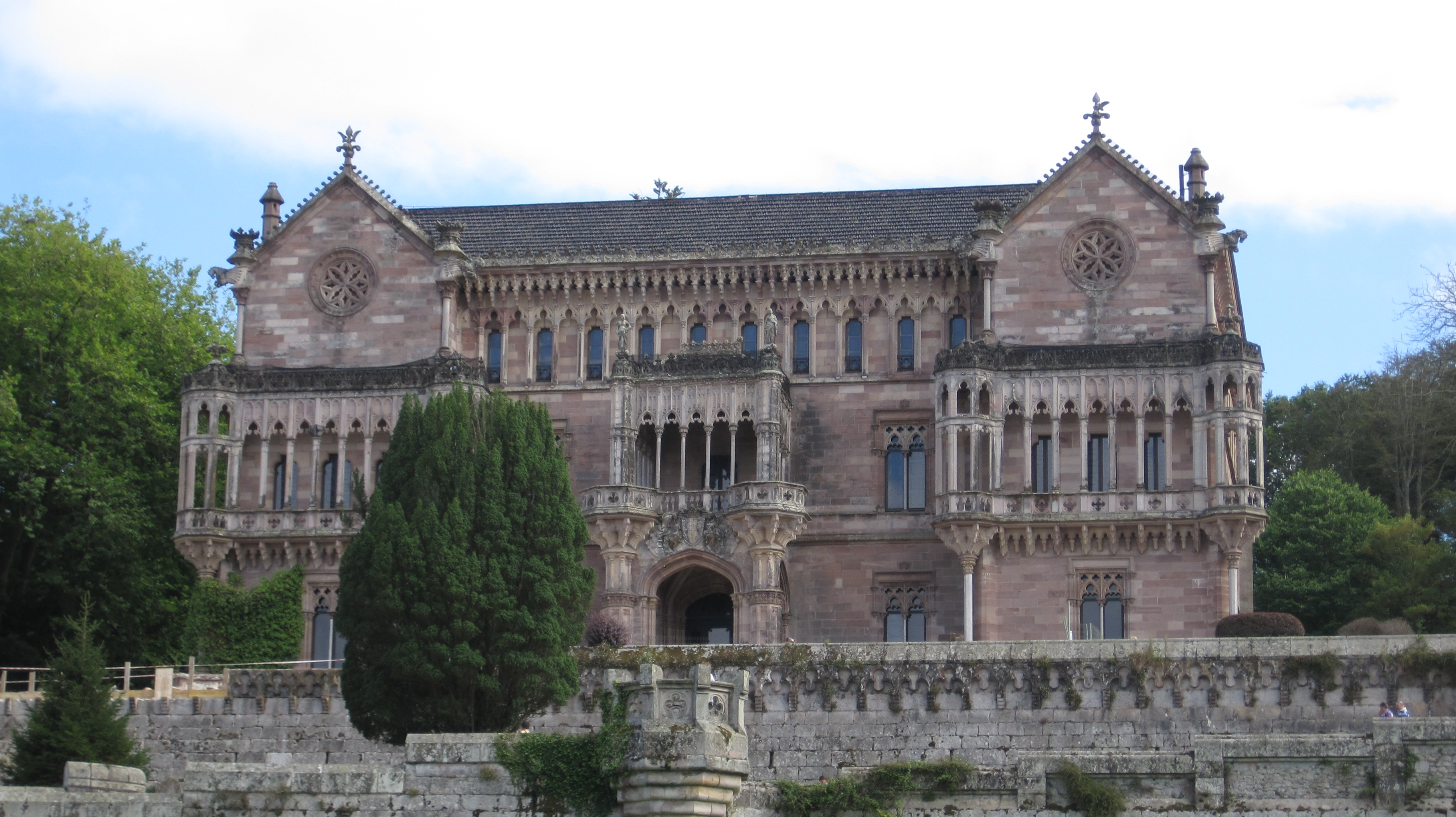 Fachada del palacio de Sobrellano, en Comillas (Cantabria, España).